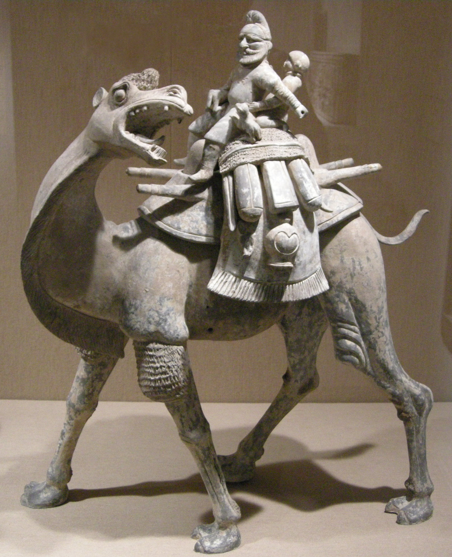 Met, camel and rider, Tang dynasty